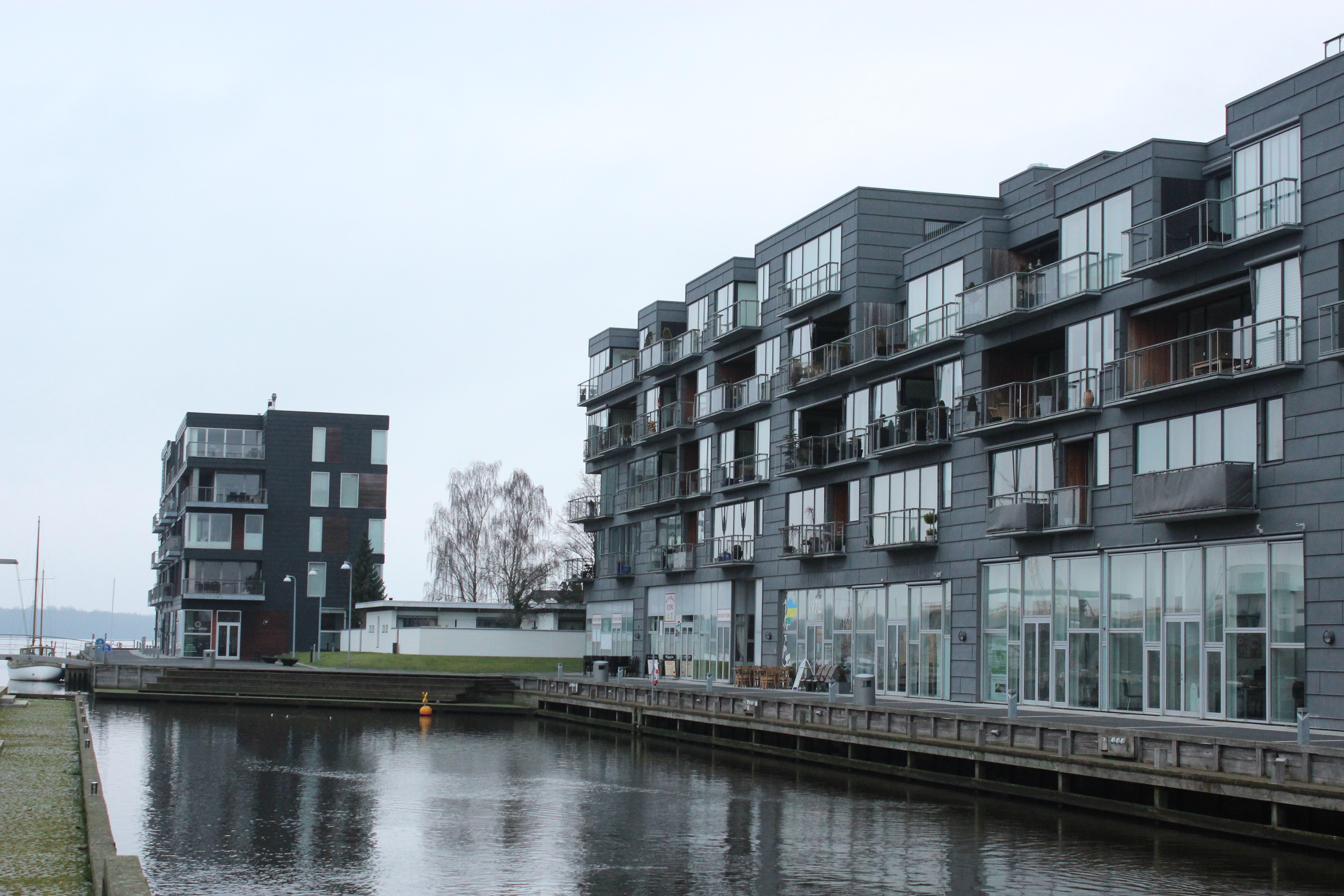 Slotsbryggen med de nybyggede lejligheder